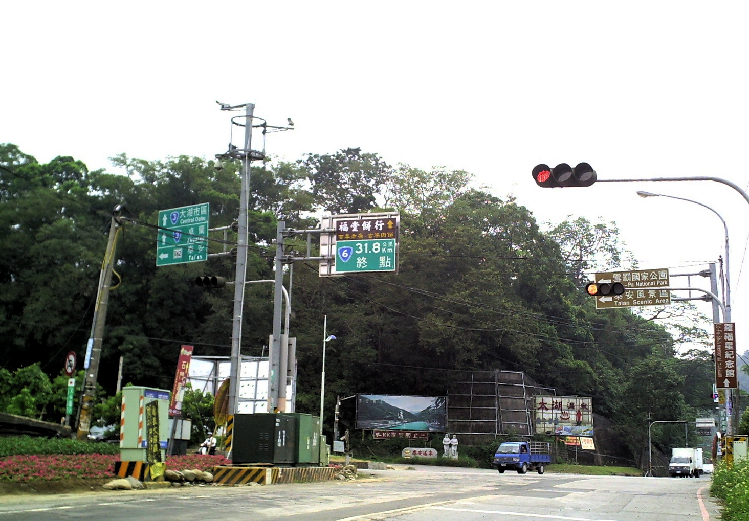 臺灣台6線舊終點，位於苗栗縣大湖鄉台3線上。